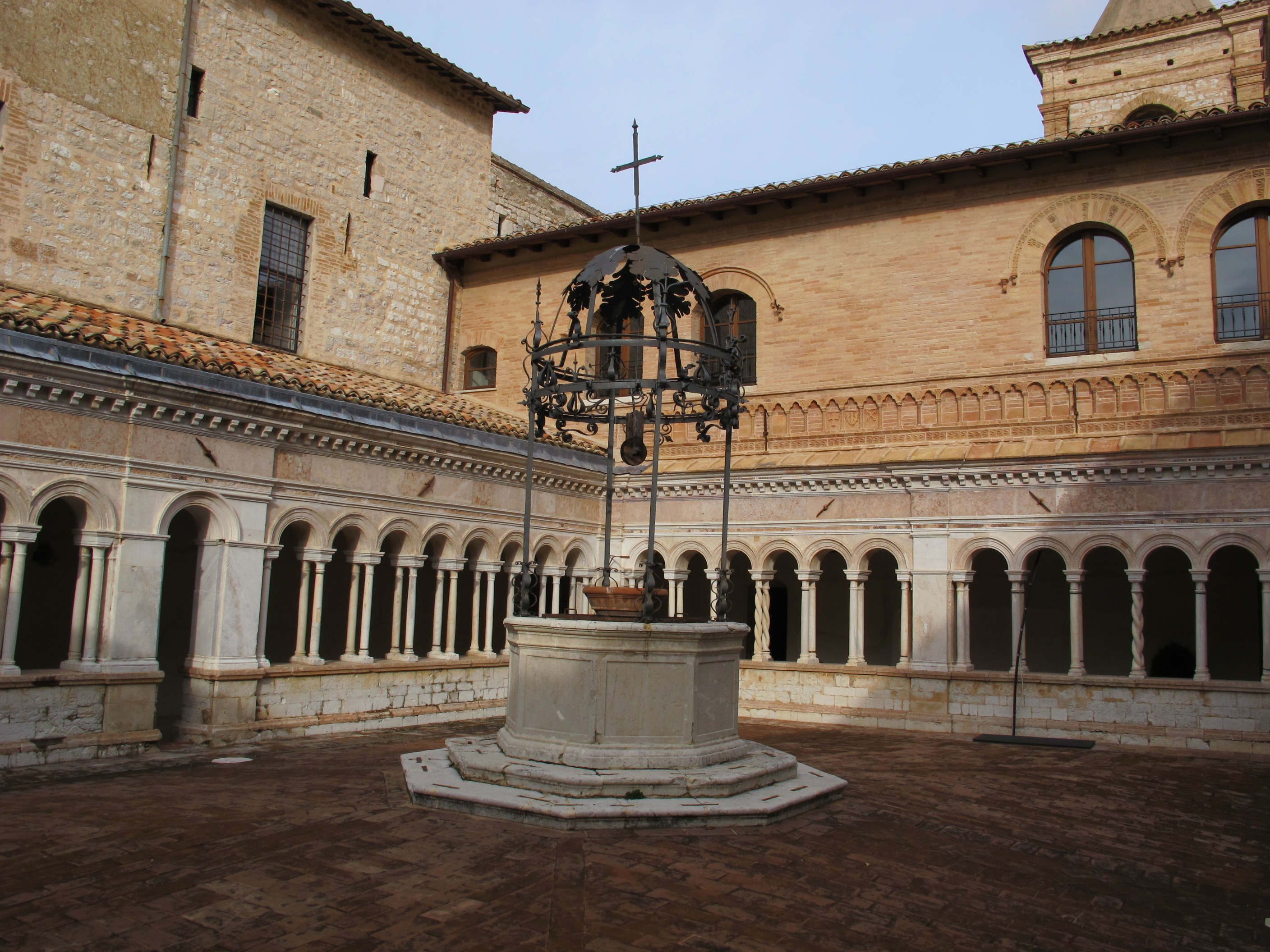 Abbazia di sassovivo, chiostro